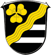 Wappen von Mittenaar